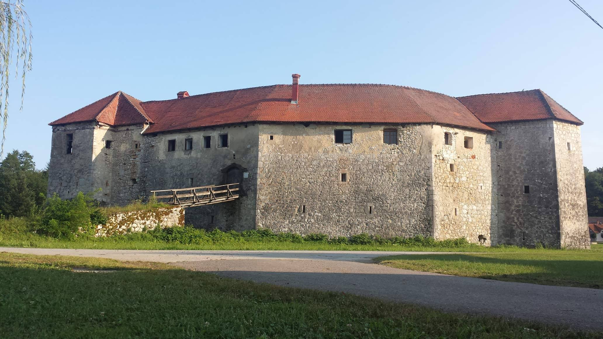 Stari grad Ribnik